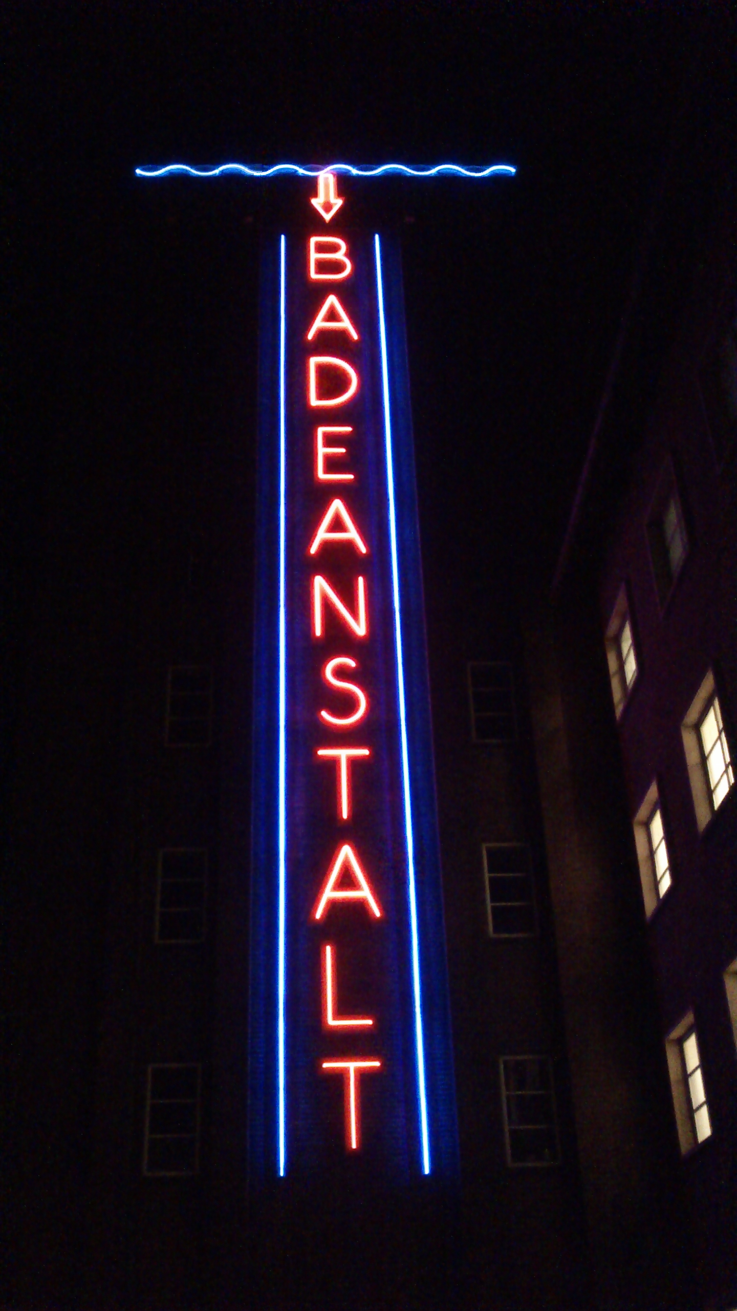 Badeanstalten Spanien by night. Neonrør på Tårnet.